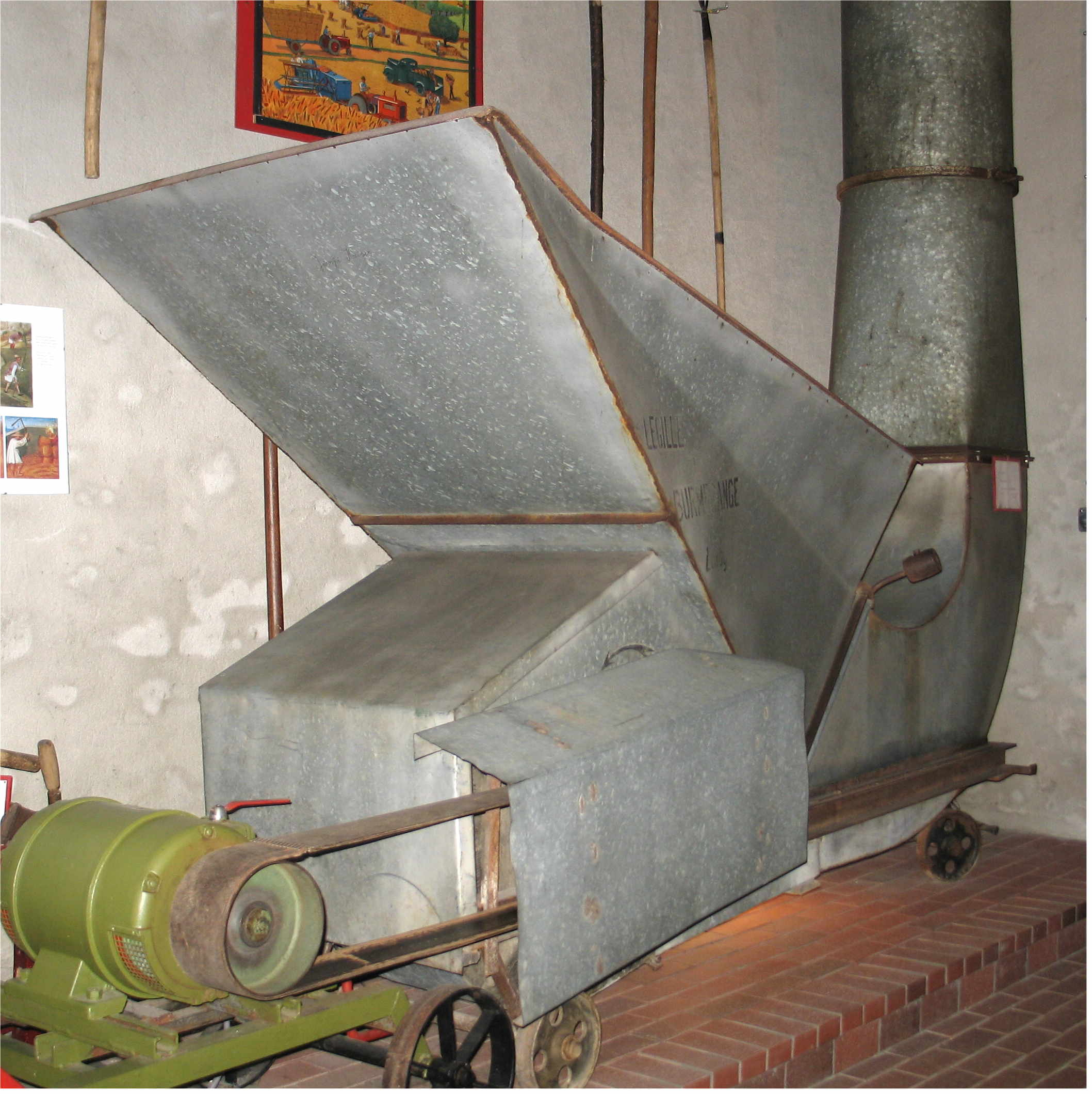 Heebléiser am Baueremusée zu Peppeng.